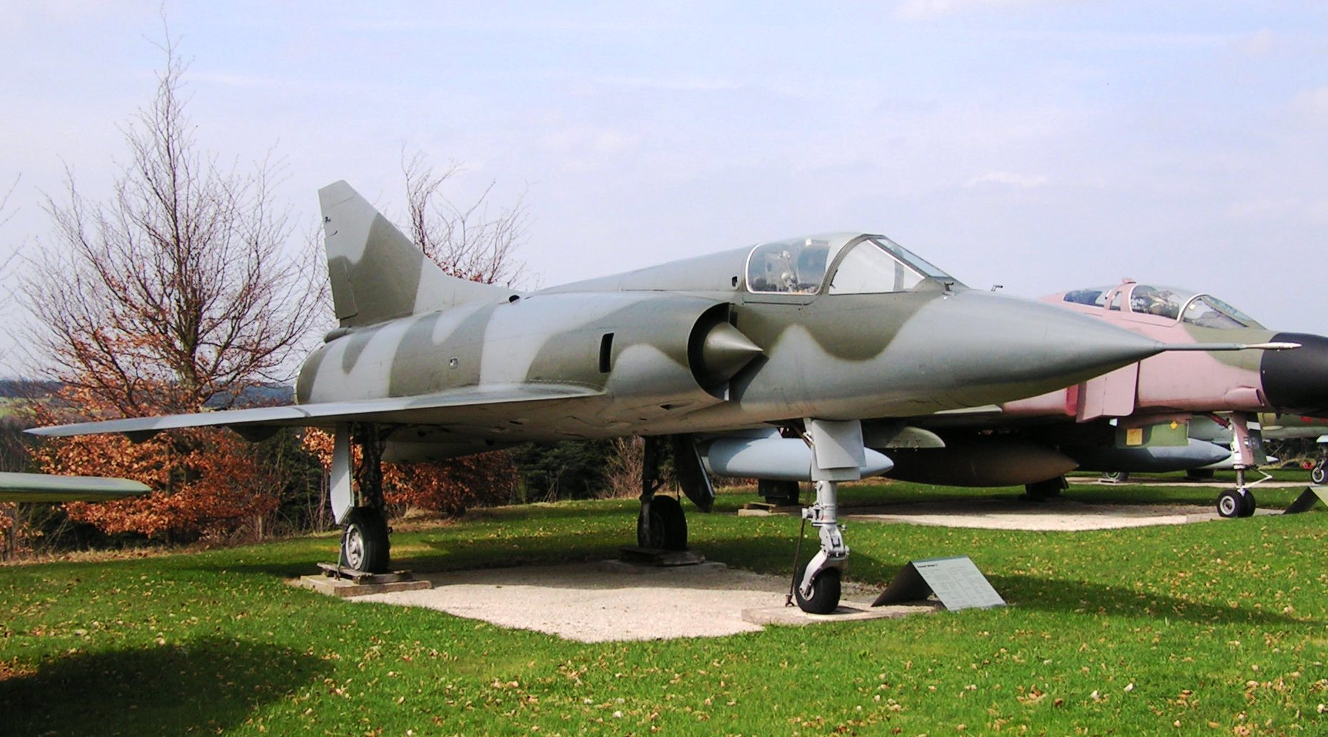 Mirage III R - eigen foto van Paul Hermans onder GNU-GFDL